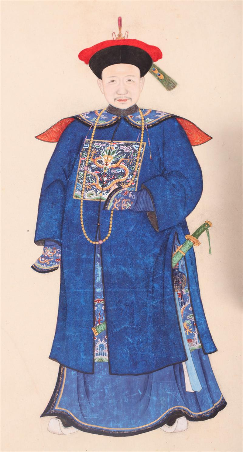 《御筆平定臺灣二十功臣像贊》中的和珅畫像，右邊有清朝乾隆皇帝的御筆題贊：「大學士三等忠襄伯和珅 承訓書諭兼通清漢旁午軍書惟眀且斲平薩拉尔尔曾督戰賜爵勵忠竟成國榦」。《御筆平定臺灣二十功臣像贊》於2014年由紐約iGavel拍賣行拍賣。